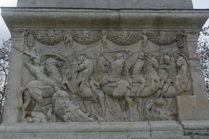 Saint-Rémy-de-Provence, France